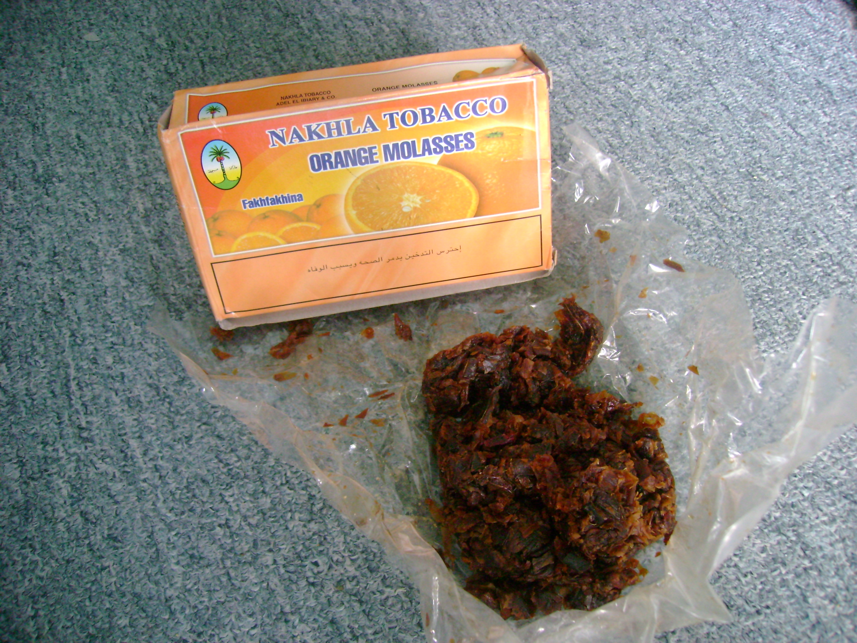 nakhla orange tabak open with molasses